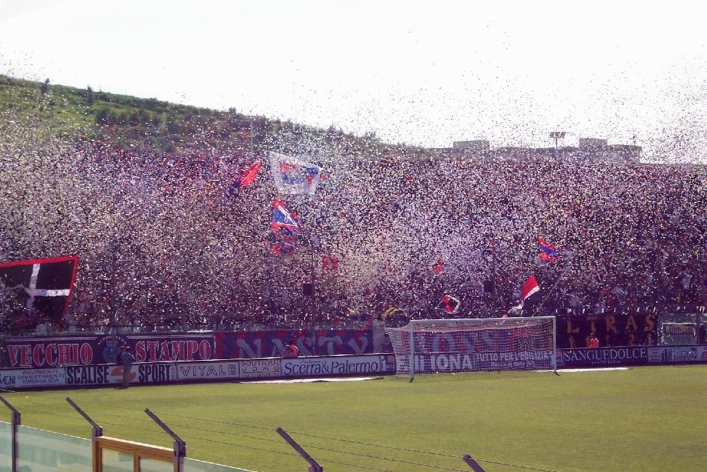 opera propria, curva crotone